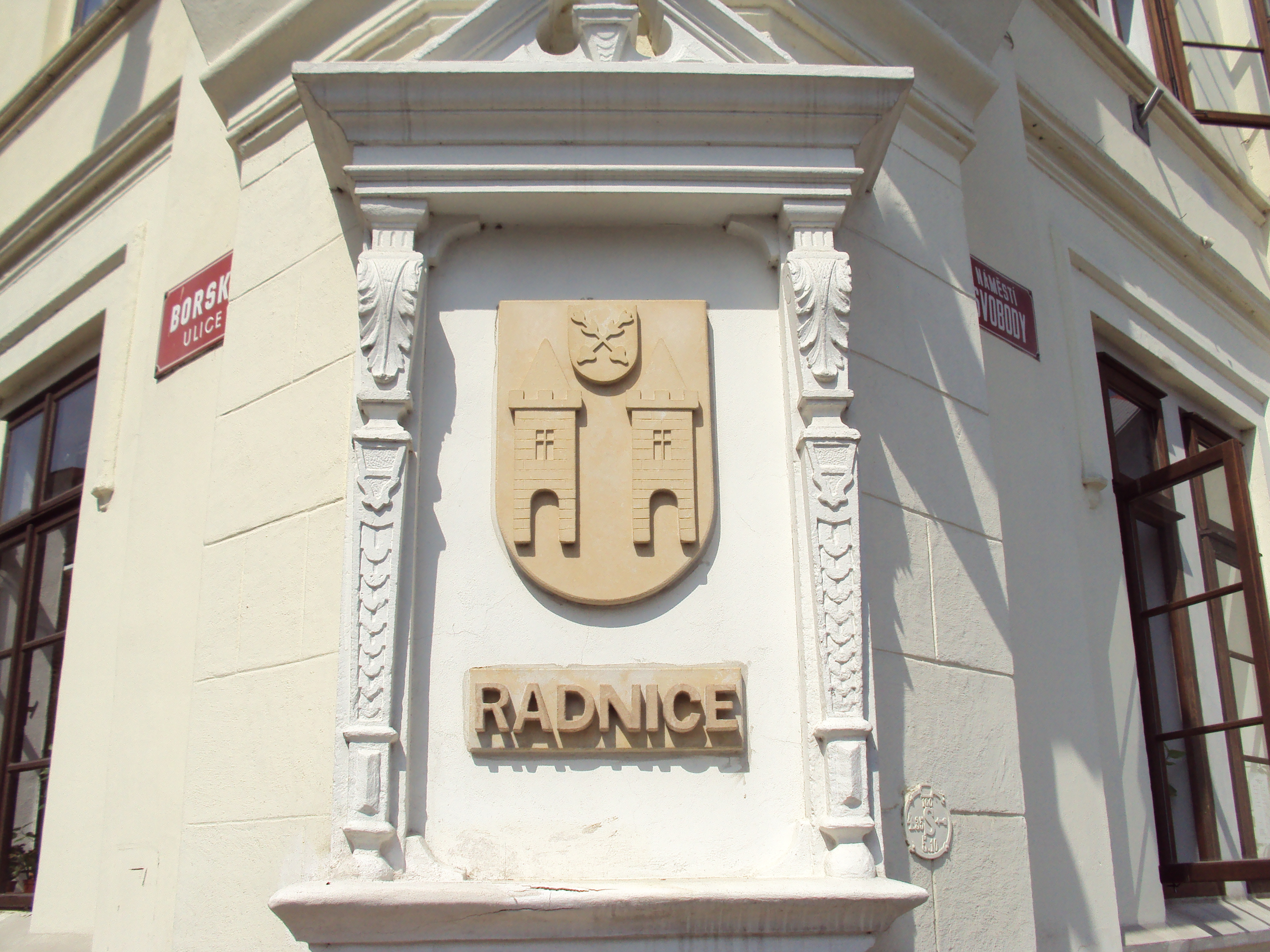 Znak města Zákupy vytvořen na radnici